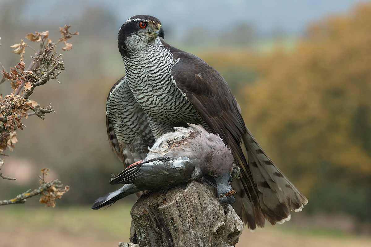 Astore Sardo (Accipiter gentilis arrigonii)